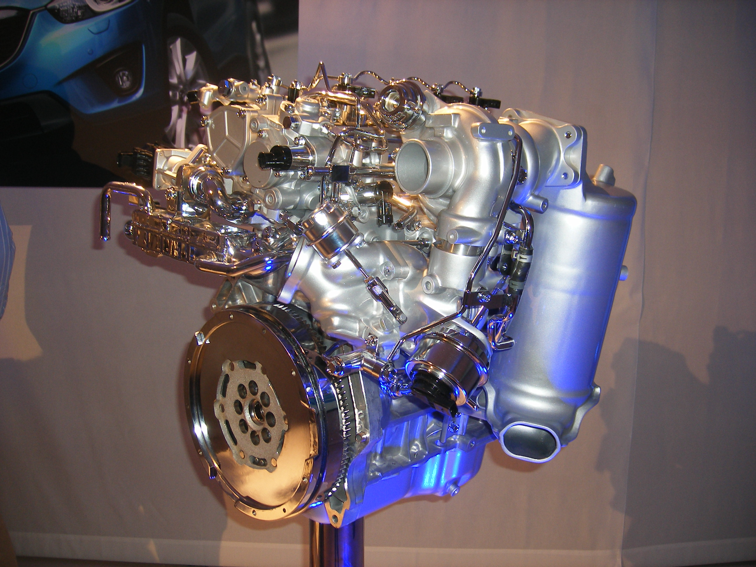 Motor diésel Skyactiv-D, caracterizado por su baja relación de compresión: 14,0 a 1